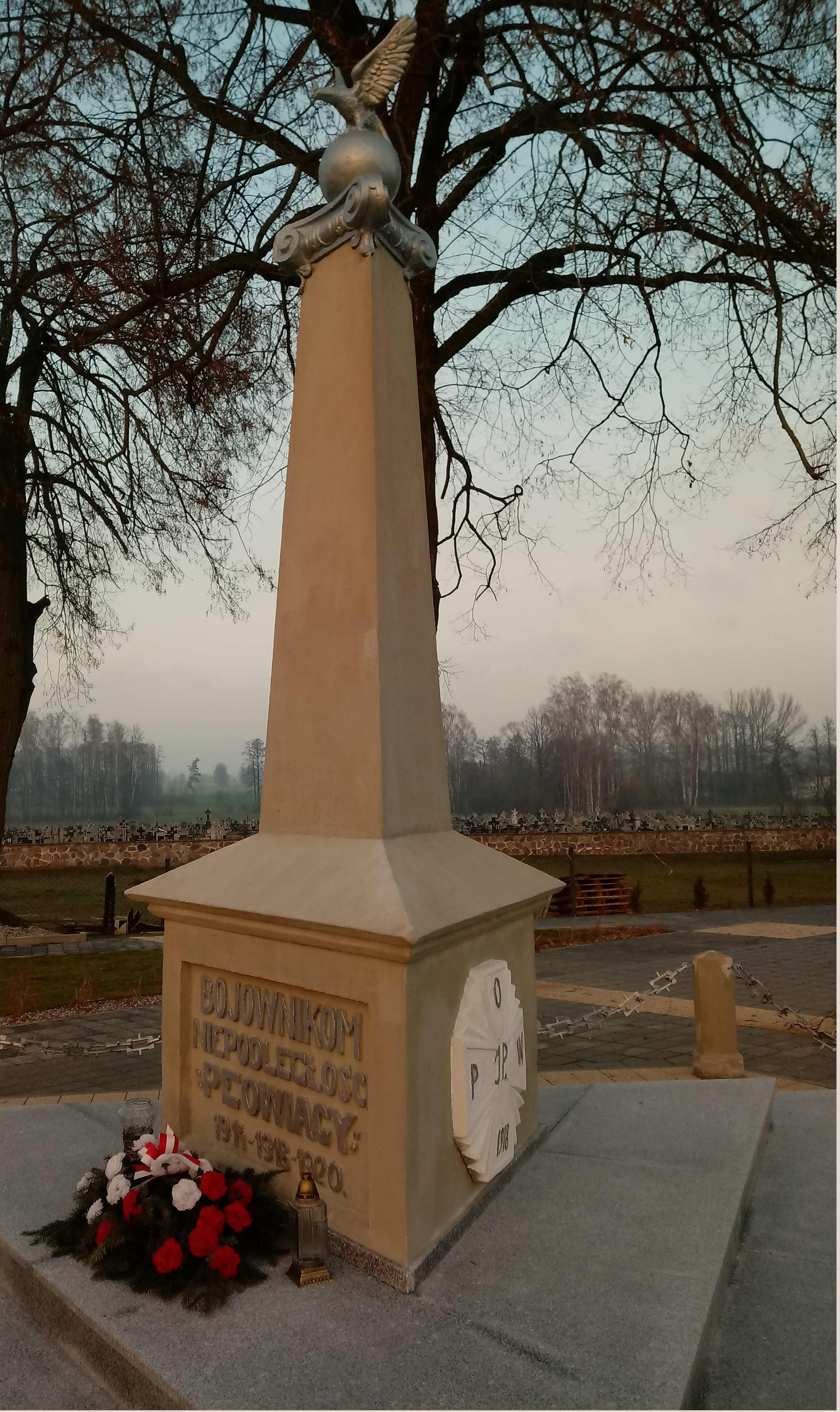 Pomnika POW ku chwale poległych osłonięto 30 sierpnia 1936 roku. Rewitalizacja wraz z placem 2017 roku.